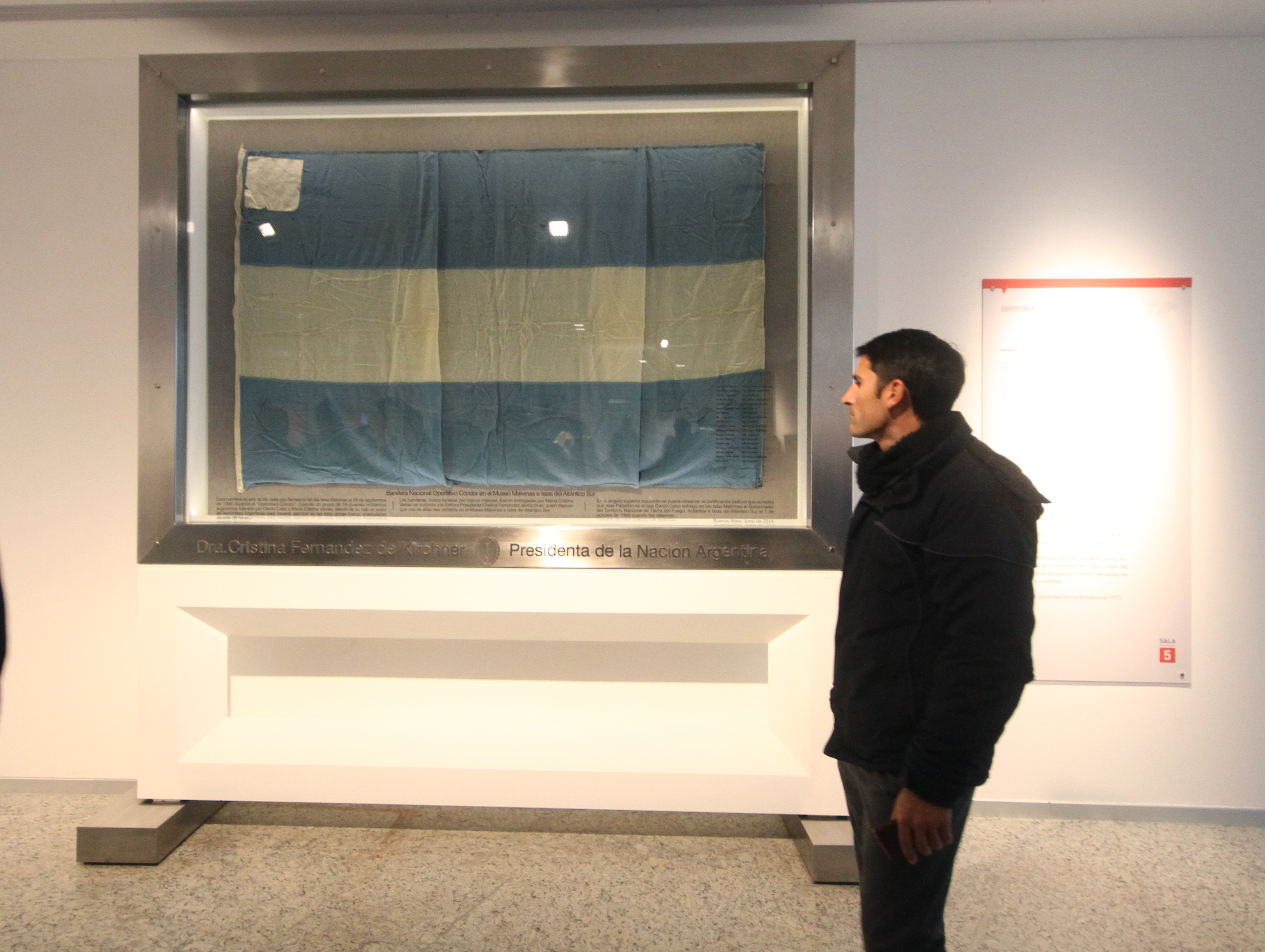 Buenos Aires, 8 de Agosto de 2014 En el Museo Malvinas e Islas del Atlántico Sur, se realizó un recorrido especial para prensa, guiado por el director del museo, Jorge Giles; el subdirector, Mario Volpe (excombatiente de Malvinas); Juan Rattenbach, jefe de guías y nieto de Benjamín (responsable del conocido informe) y Silvina Gutiérrez, bióloga y subdirectora del área de Flora y Fauna. Fotos: Silvina Frydlewsky / Ministerio de Cultura de la Nación